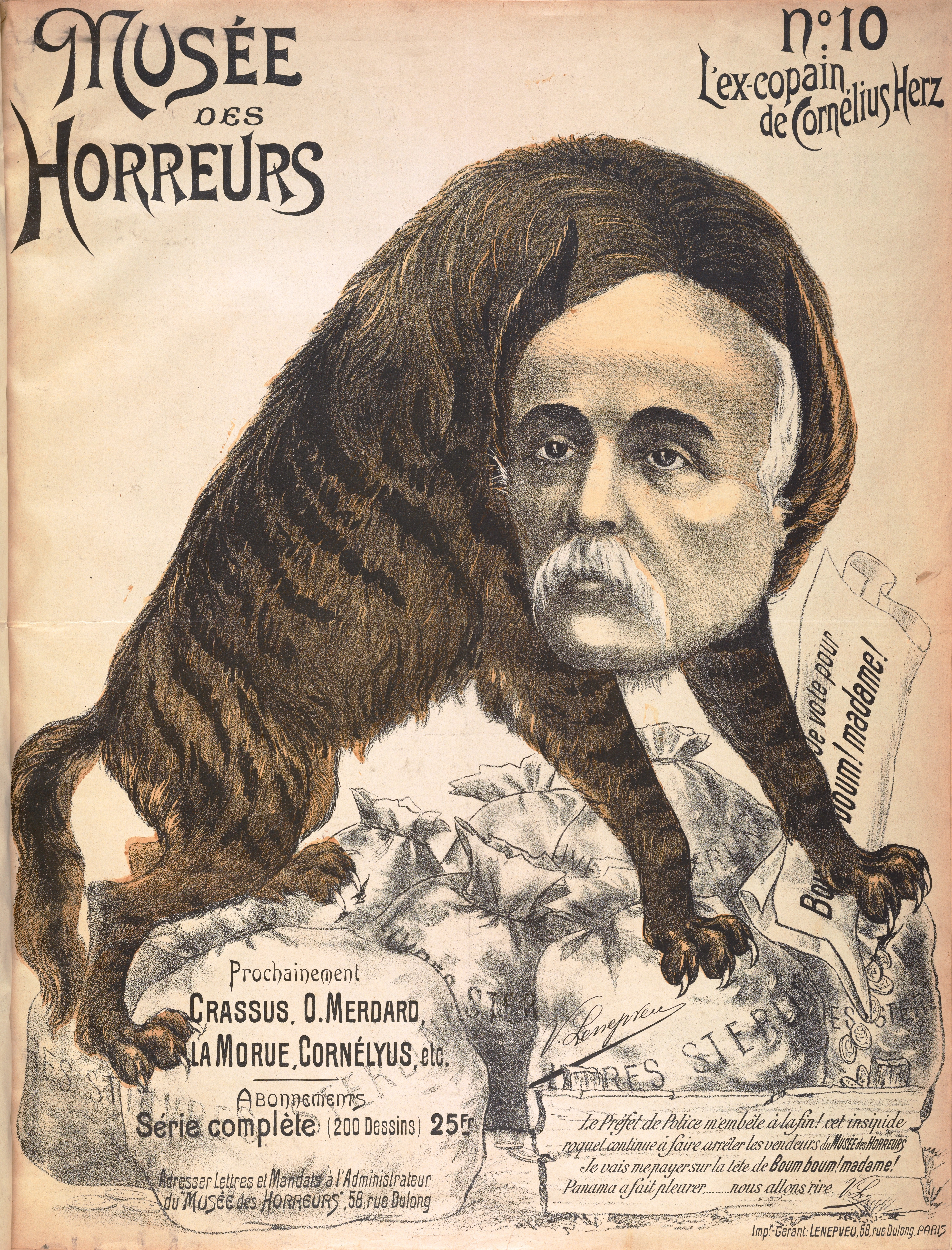 "L'ex-copain de Cornélius Herz".